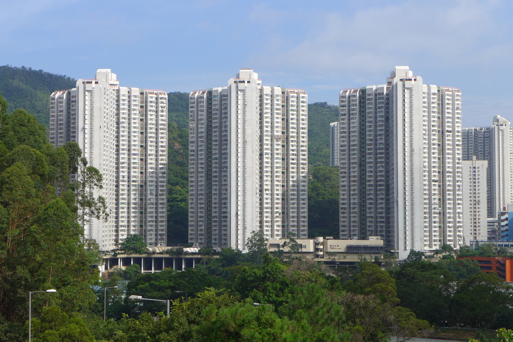 Hing Tin Estate